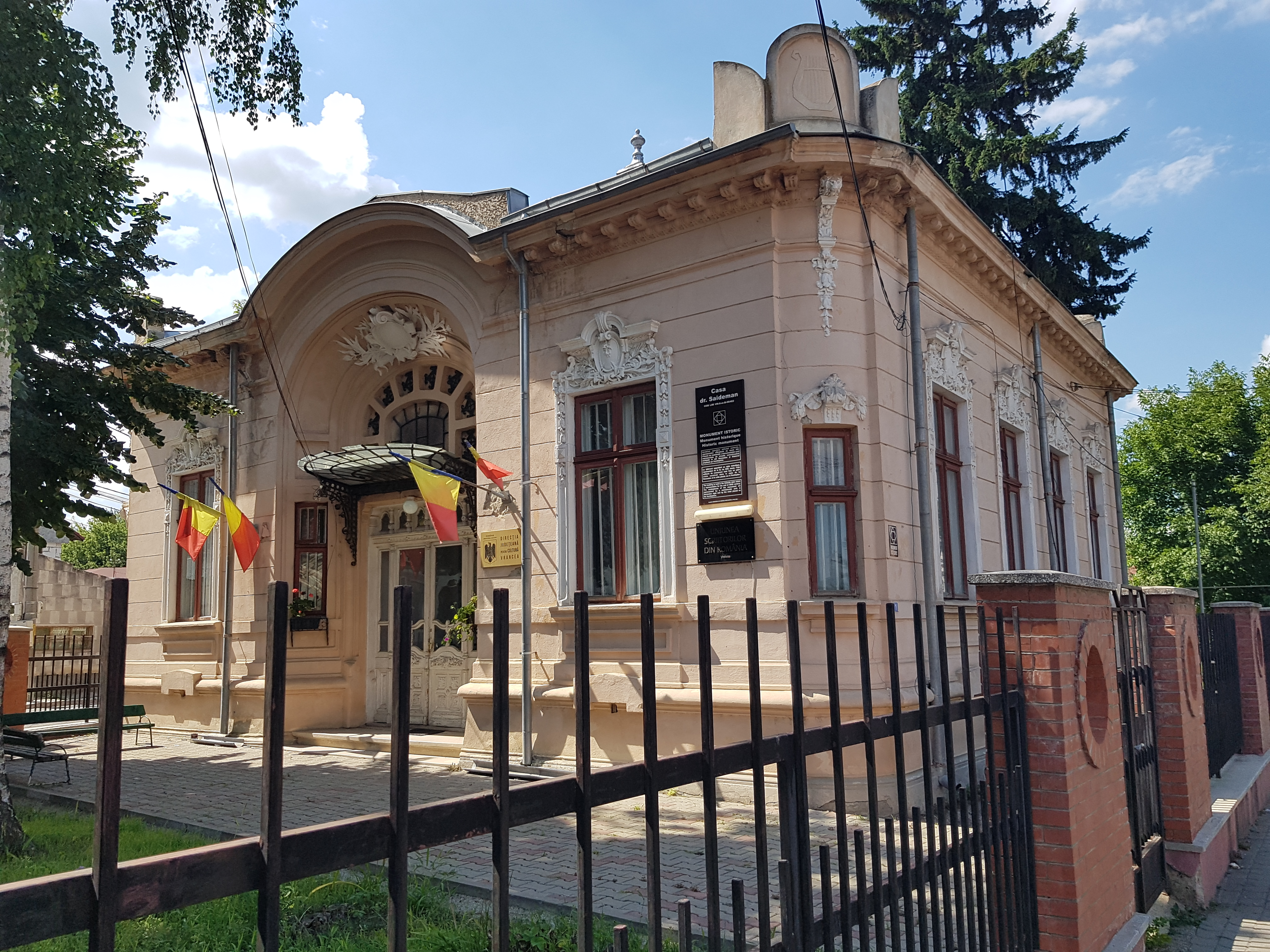 Casa dr. Saideman